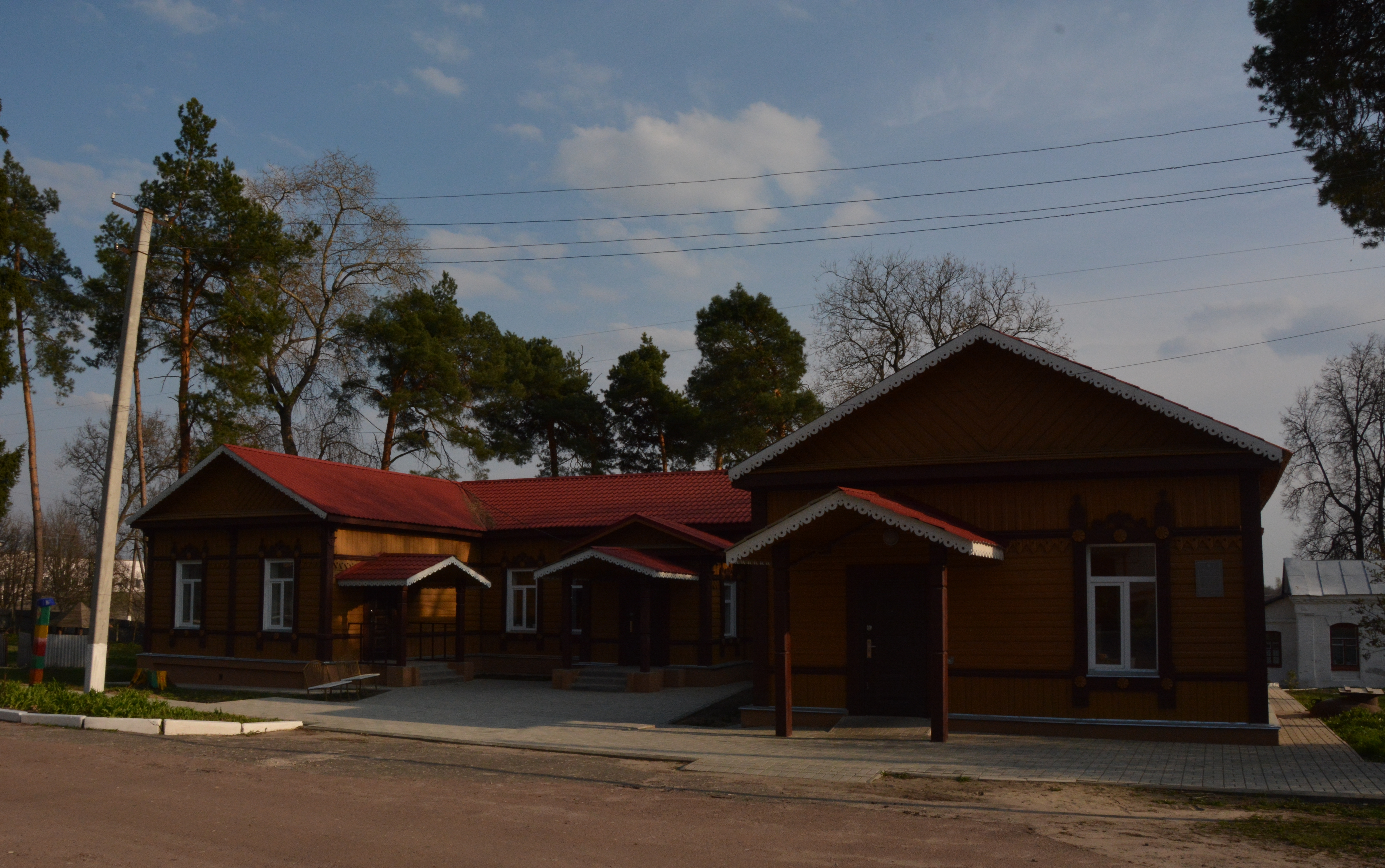 Комплекс земської лікарні, Глухів, вул. Інститутська, 3